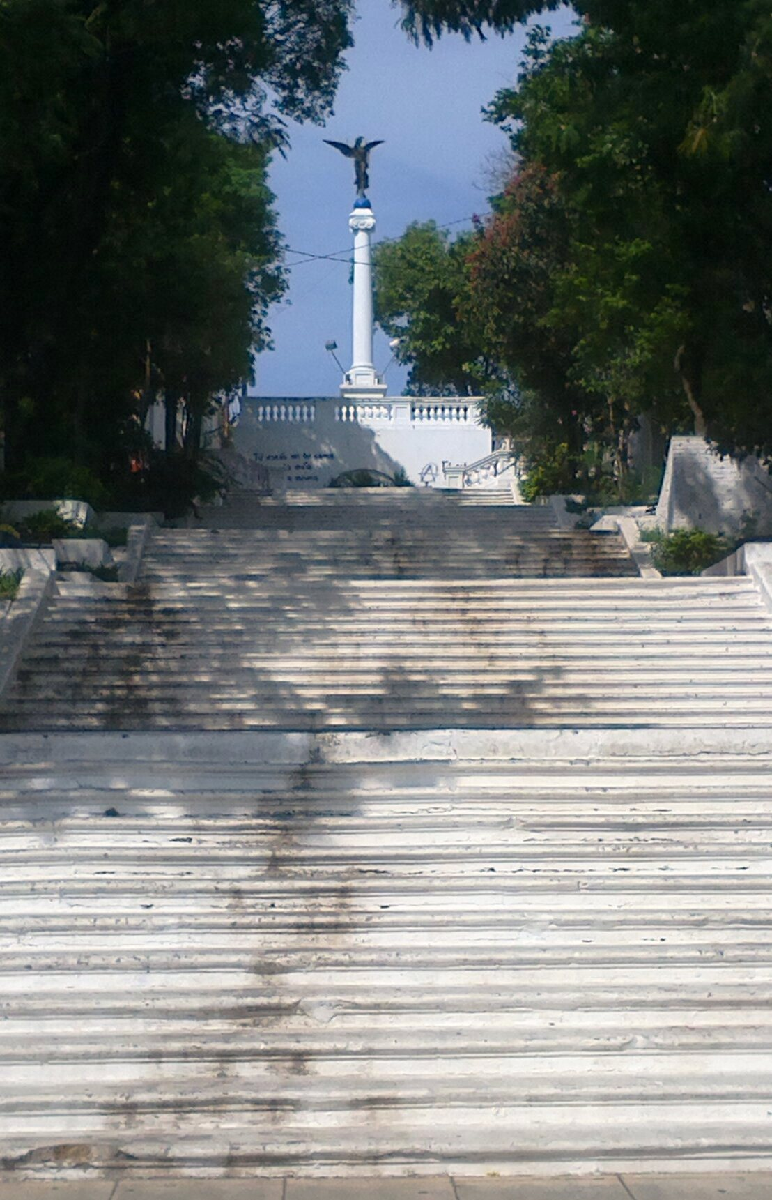 Escalinata de Antequera - Asunción Paraguay